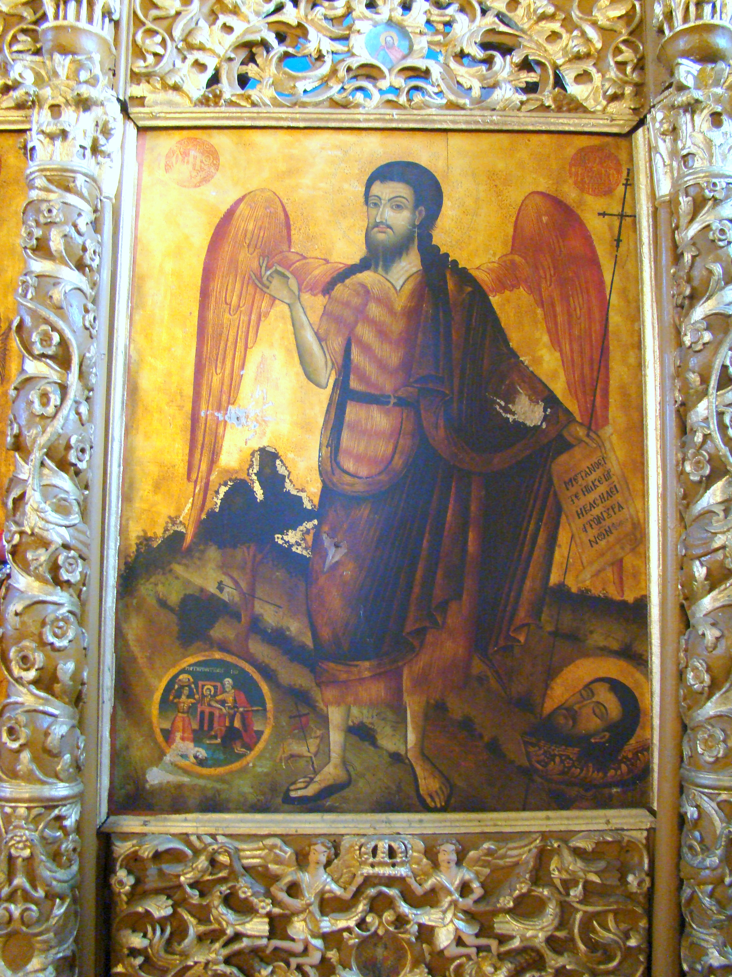 Biserica ortodoxă „Sf. Arhangheli Mihail și Gavriil”, sat Vadu Crișului; comuna Vadu Crișului